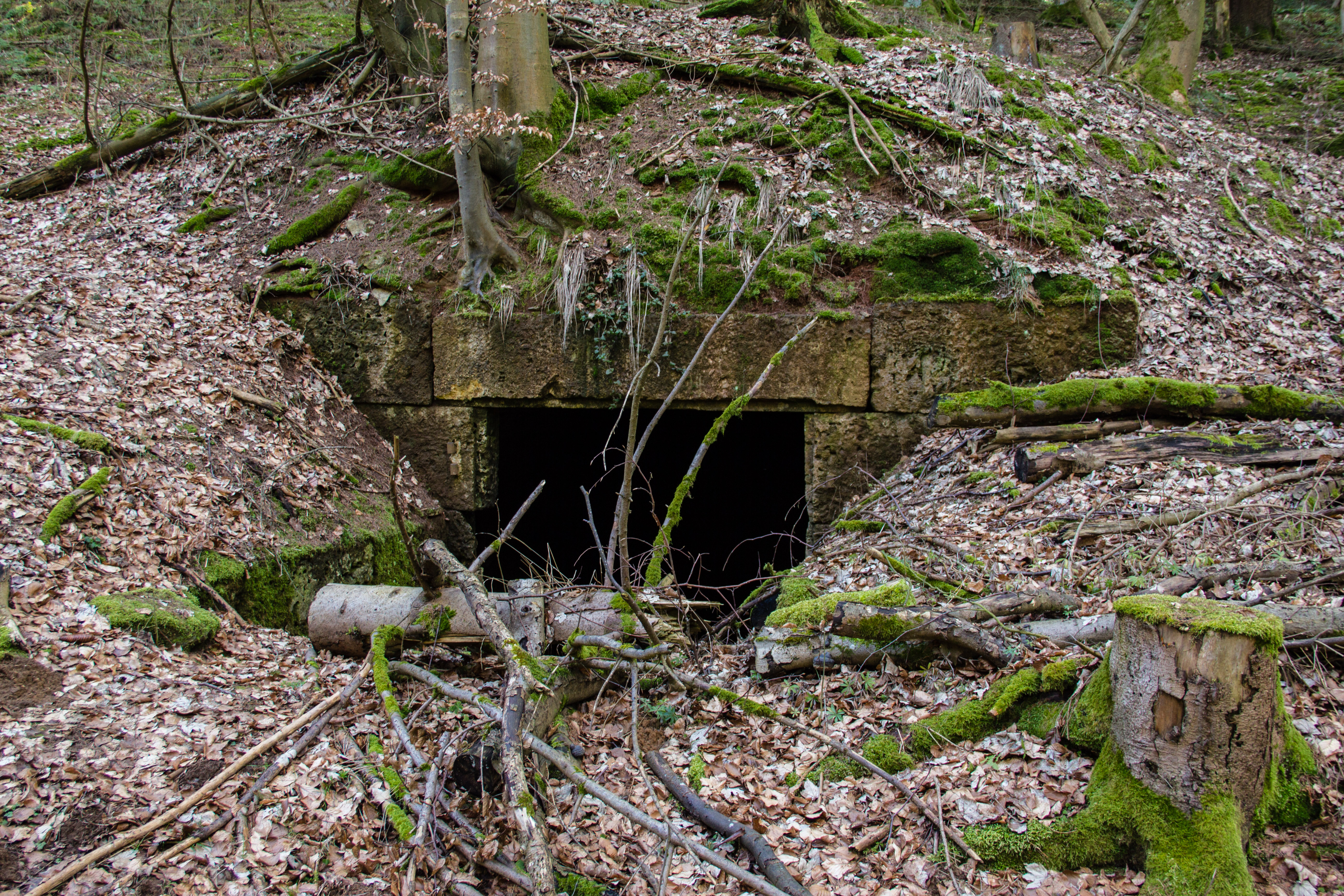 Stollen der Barbara-Zeche, Westheim, Hahnenkamm